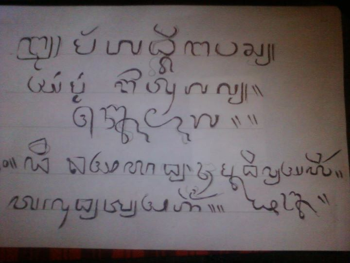 Cacarakan Cirebon (Pada Masjid Nur Karomah (Sir Budi Rahsa), Desa Gamel, Kec. Plered, Kab. Cirebon. Photo : Guntur Samudro P)